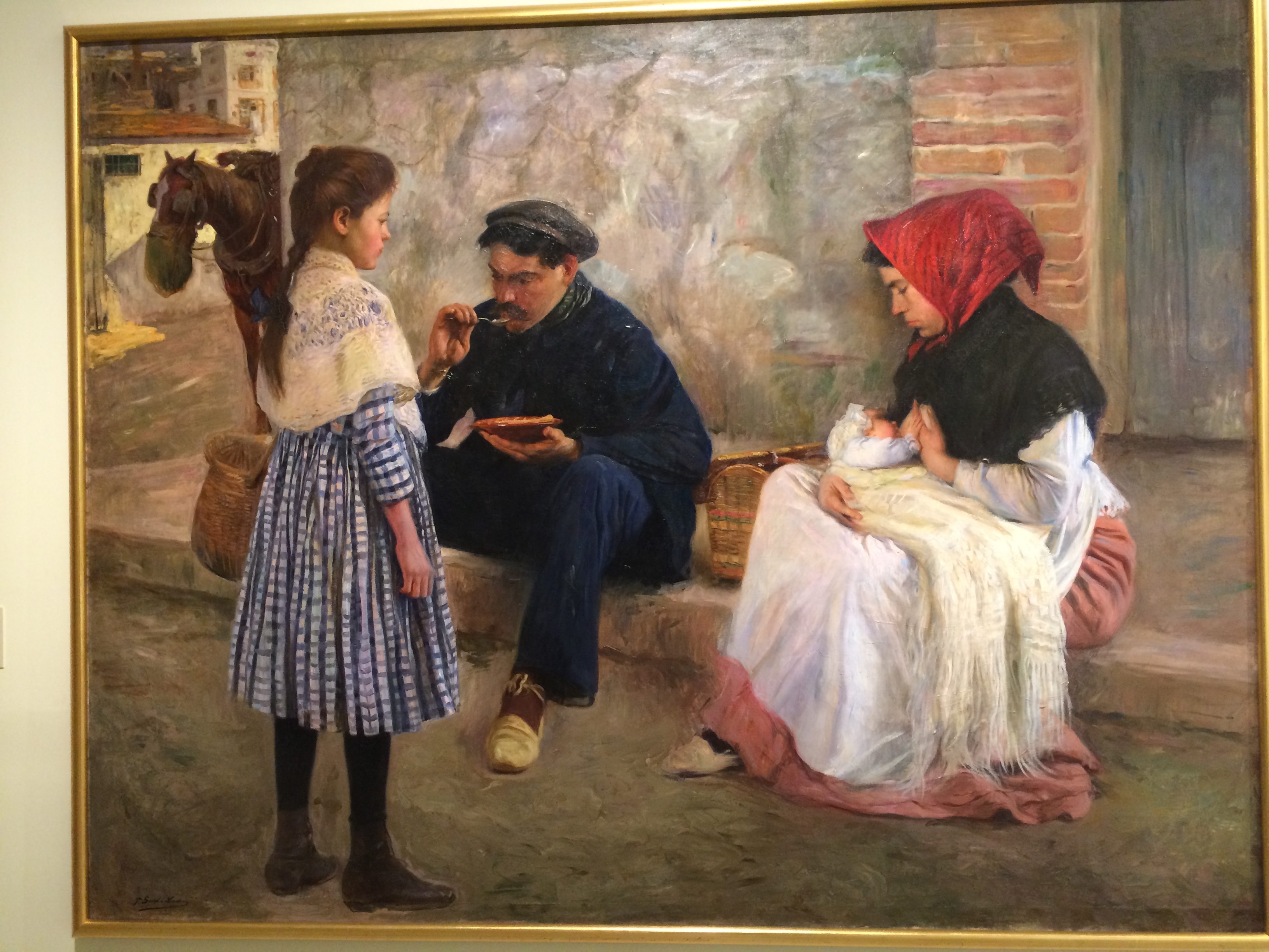 Le Dîner de l'ouvrier. Huile sur toile de Francesc Sardà Ladico (1877-1912). Exposé au Musée National d'Art de Catalogne, à Barcelone.